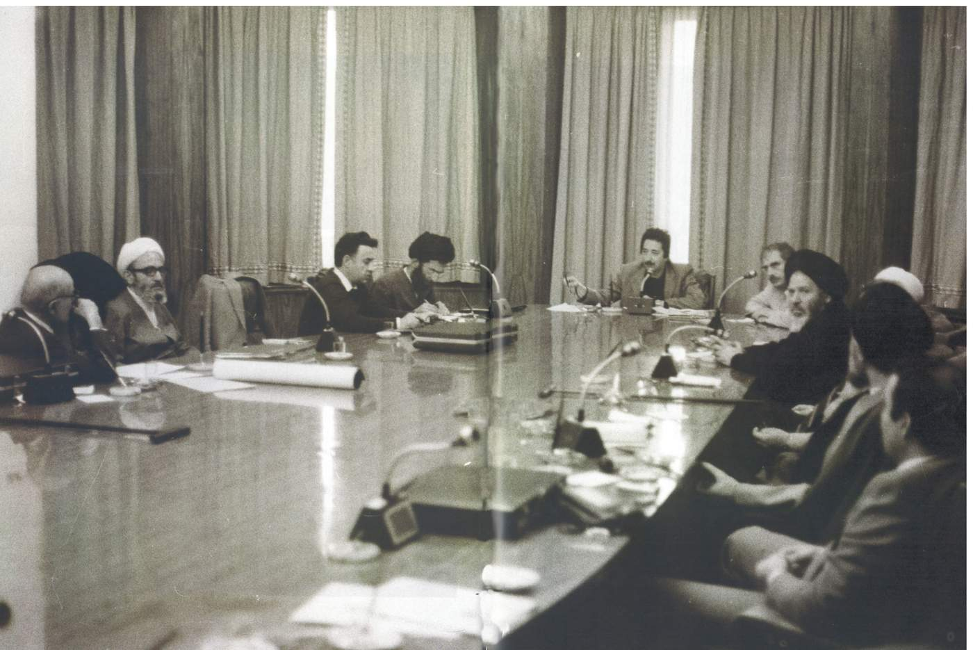 جلسه شورای انقلاب به ریاست ابوالحسن بنی‌صدر. از چپ: مهدی بازرگان، محمدرضا مهدوی کنی، یدالله سحابی، علی خامنه‌ای، ابوالحسن بنی‌صدر، حسن حبیبی و سید عبدالکریم موسوی اردبیلی